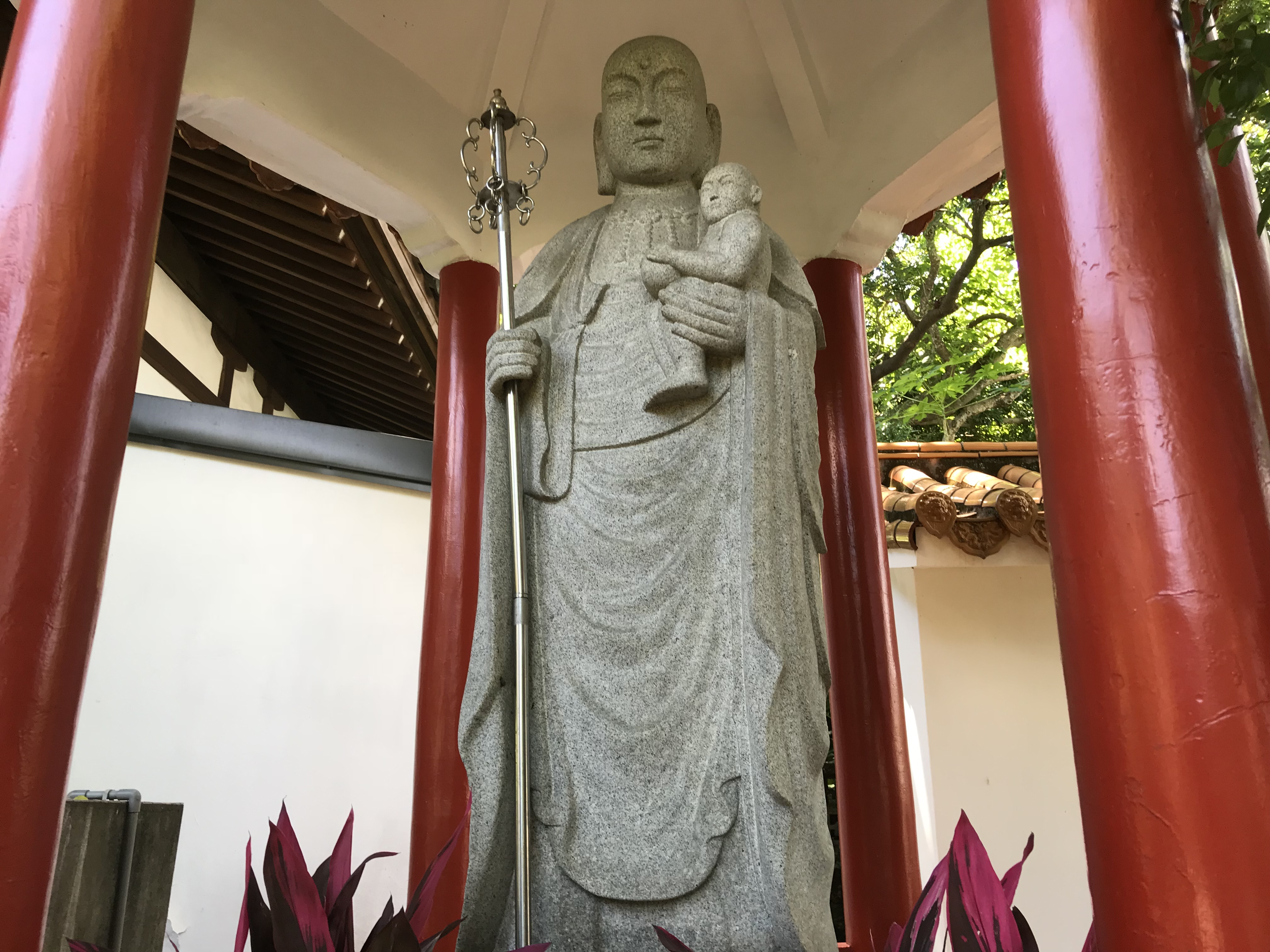 北投普濟寺子安地藏像